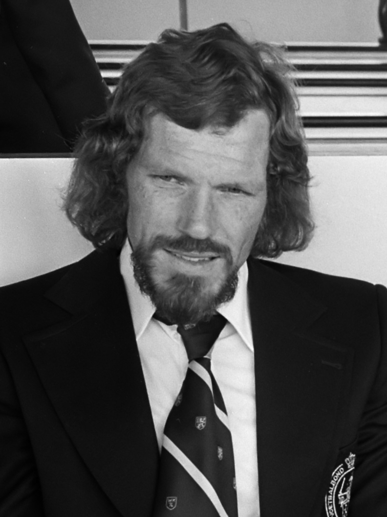 Vertrek van het Nederlands voetbalelftal van Schiphol voor de interland tegen West-Duitsland 16 mei 1975